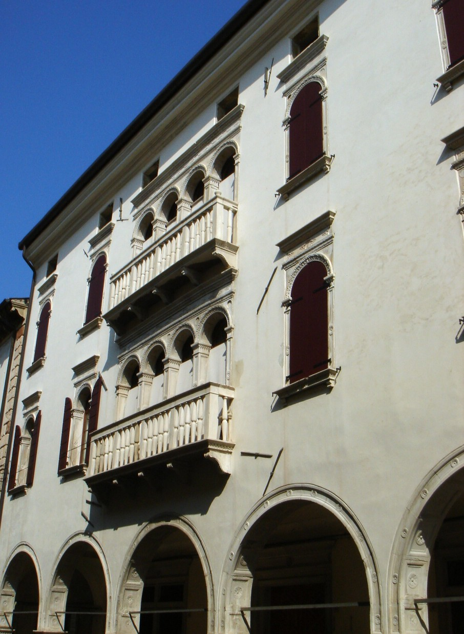 Serravalle di Vittorio Veneto (Treviso): facciata di Palazzo Sarcinelli (XVI sec.) sulla Cal Granda.